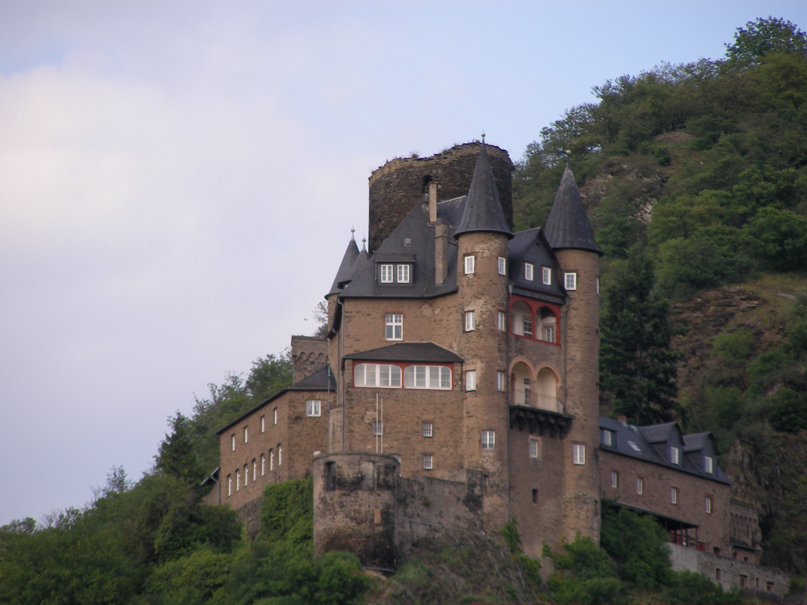 Burg Katz (Castle Katz), St. Goarshausen, Germany